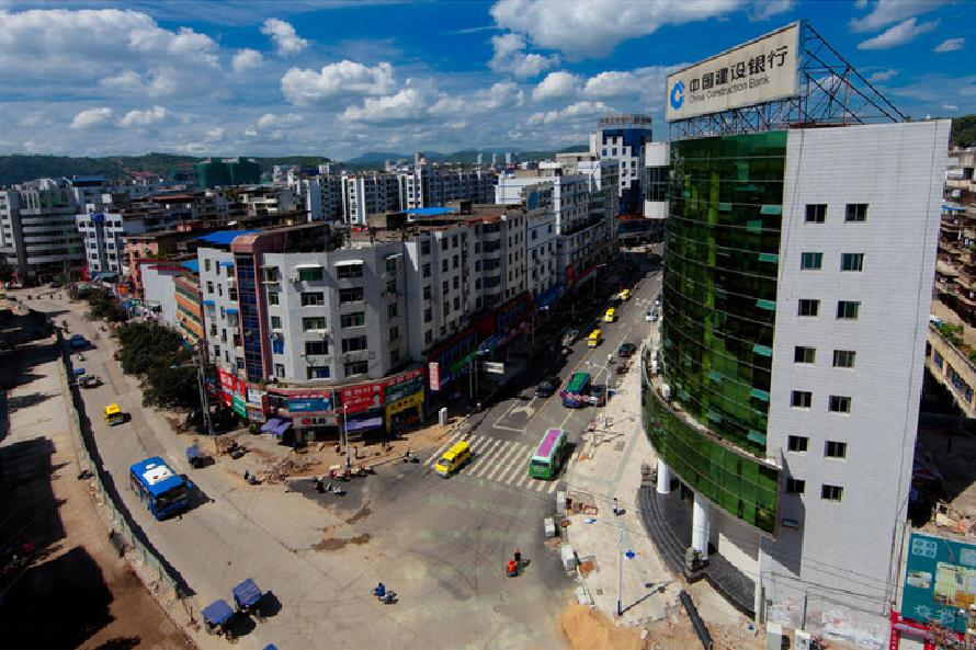 中文（中国大陆）: 建阳建行大楼位于建阳人民路与民主北路之间，图片拍摄时建阳市正在进行拓宽改造工程